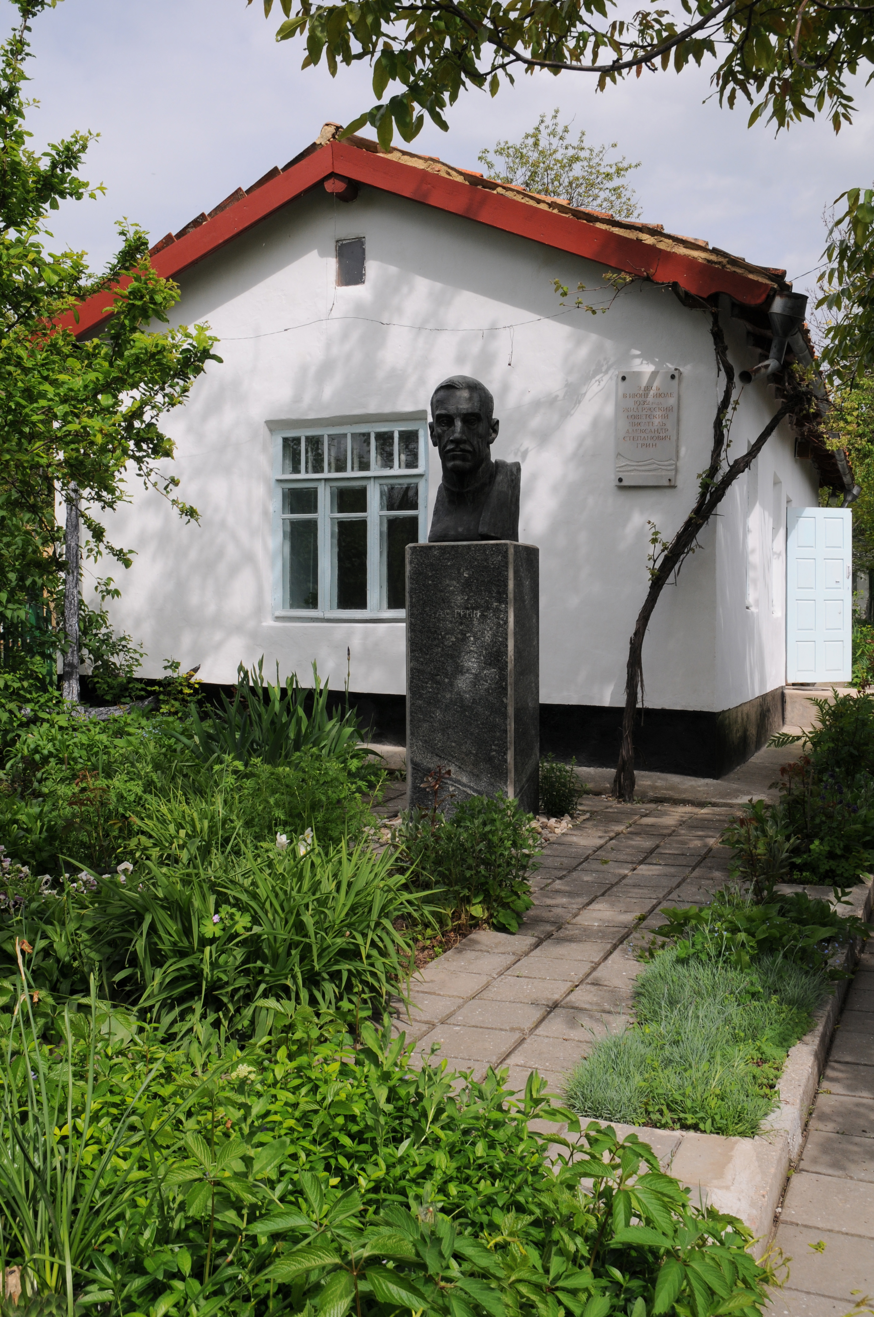 Старий Крим, Пам'ятник О.С. Гріну